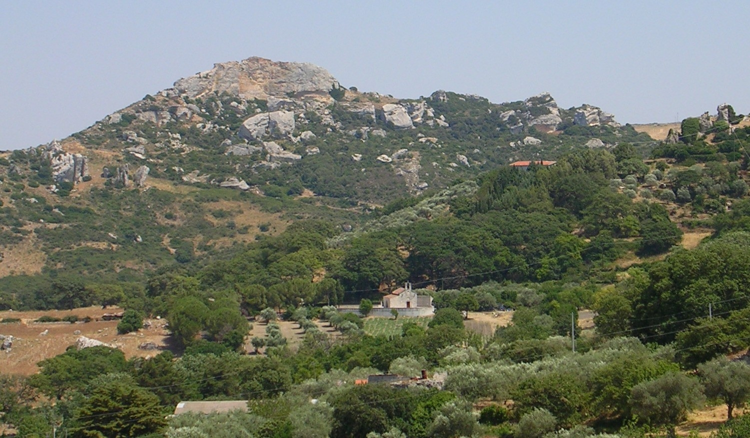 La chiesa di S Maria de Contra vista dall'abitato di Cargeghe